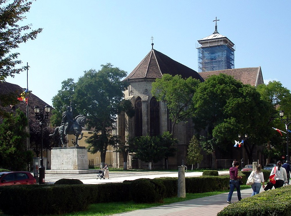 Statuia ecvestră a lui Mihai Viteazul din Alba Iulia, sculptor Oscar Han - vedere de ansamblu.jpg